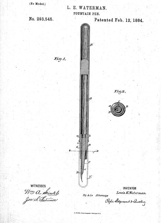 Patent pierwszego wiecznego pióra z 1884 r. Lewis Edson Waterman.